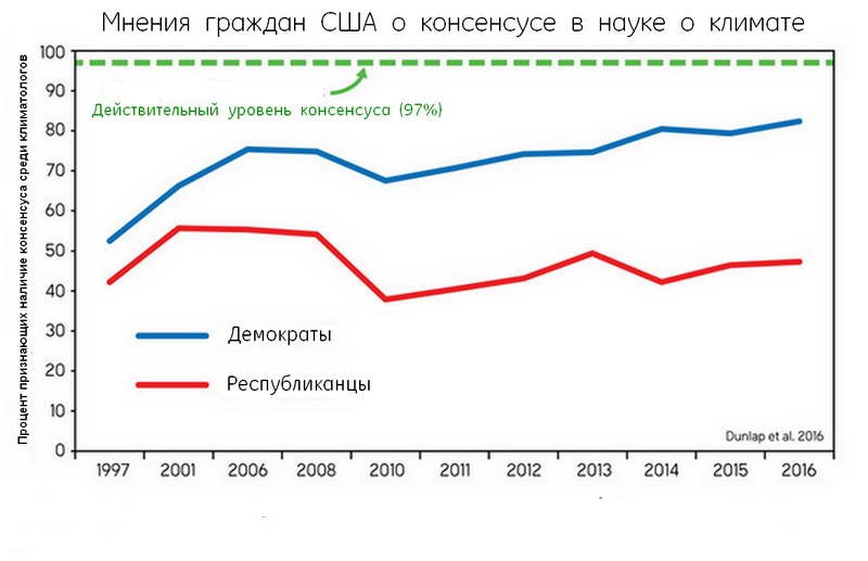 Роль политических предпочтений в оценке определенности научных знаний о климате на примере США. По данным Dunlap и др., 2016